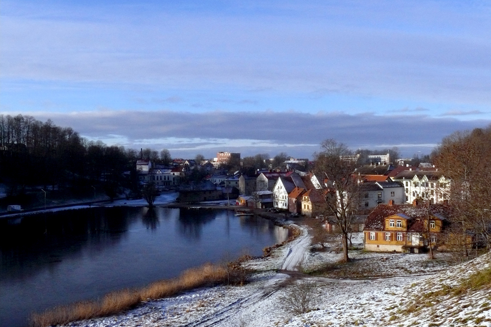 Skats uz Talsiem no Talsu pilskalna. Fotogrāfējis A.Buks 25.12.2008.